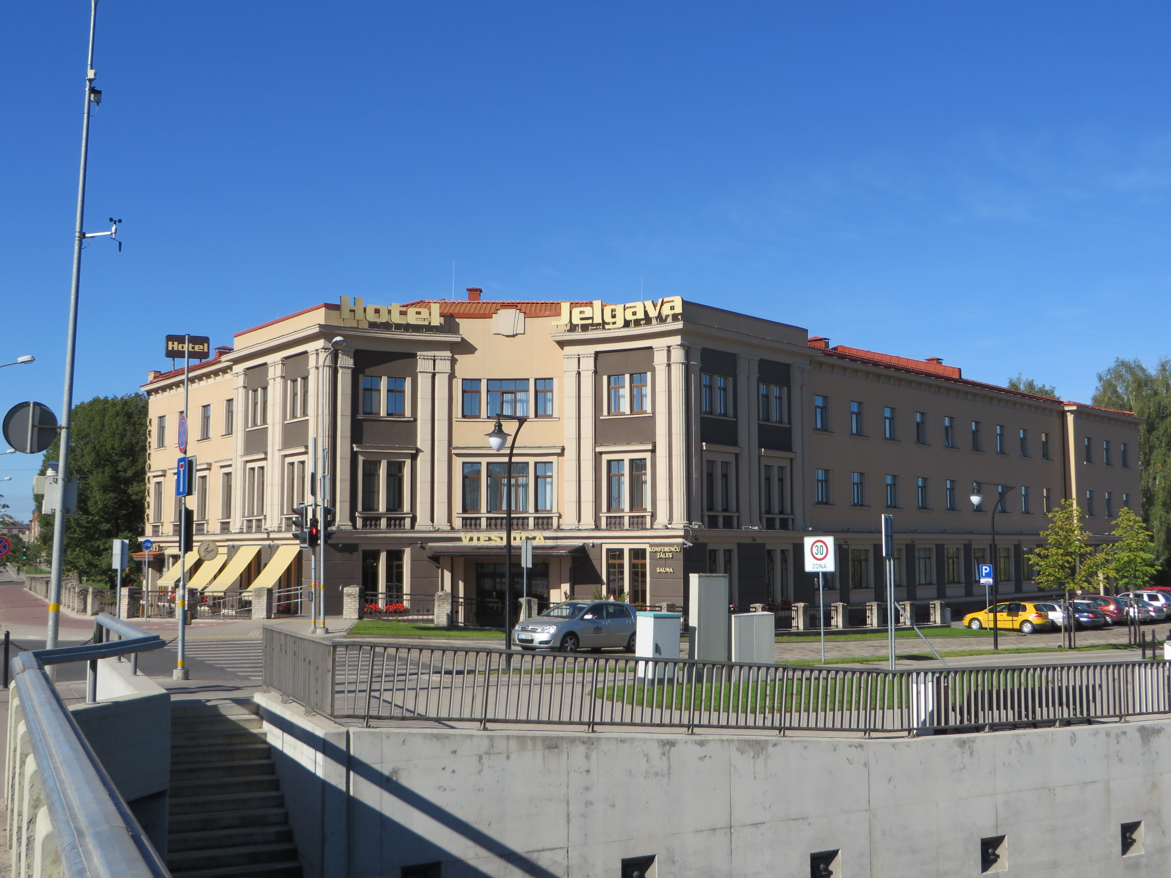 Viesnīca, Jelgava, Lielā iela 6